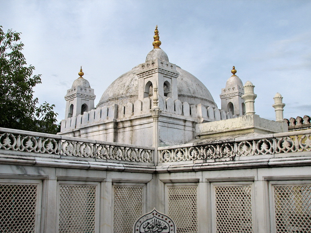 Daulatabad Fort, Maharashtra, India